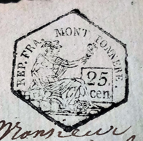 Gebührenstempel Departement Mont Tonnere, 1805 (von altem Dokument im Museum Grünstadt)